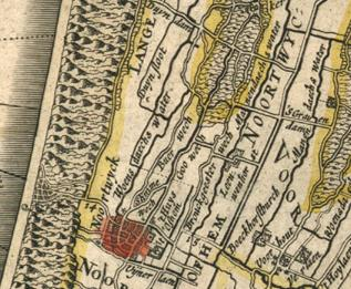 Noordwijk, Rijnland amstelland atlasmaior